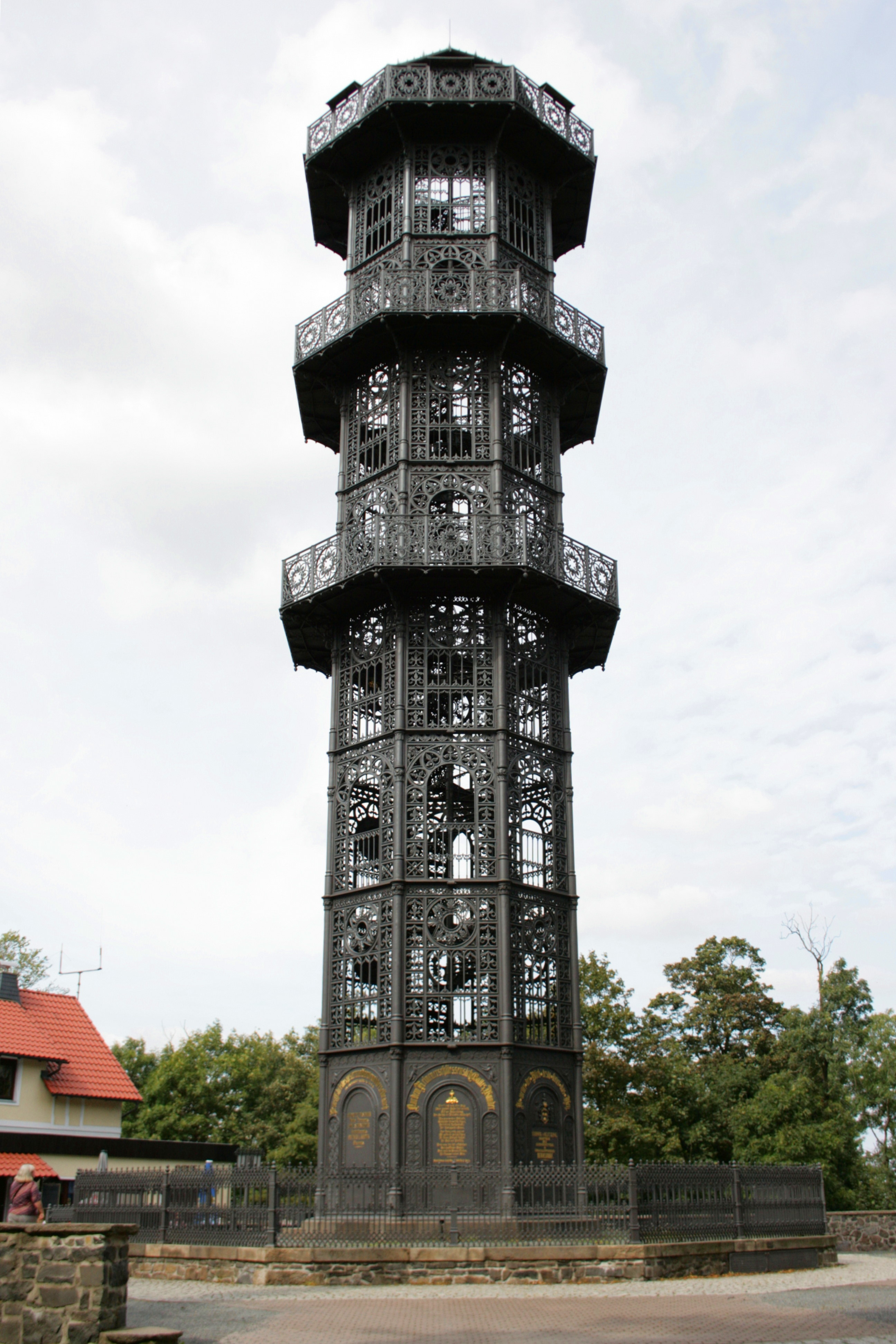 König-Friedrich-August-Turm auf dem Löbauer Berg in Löbau